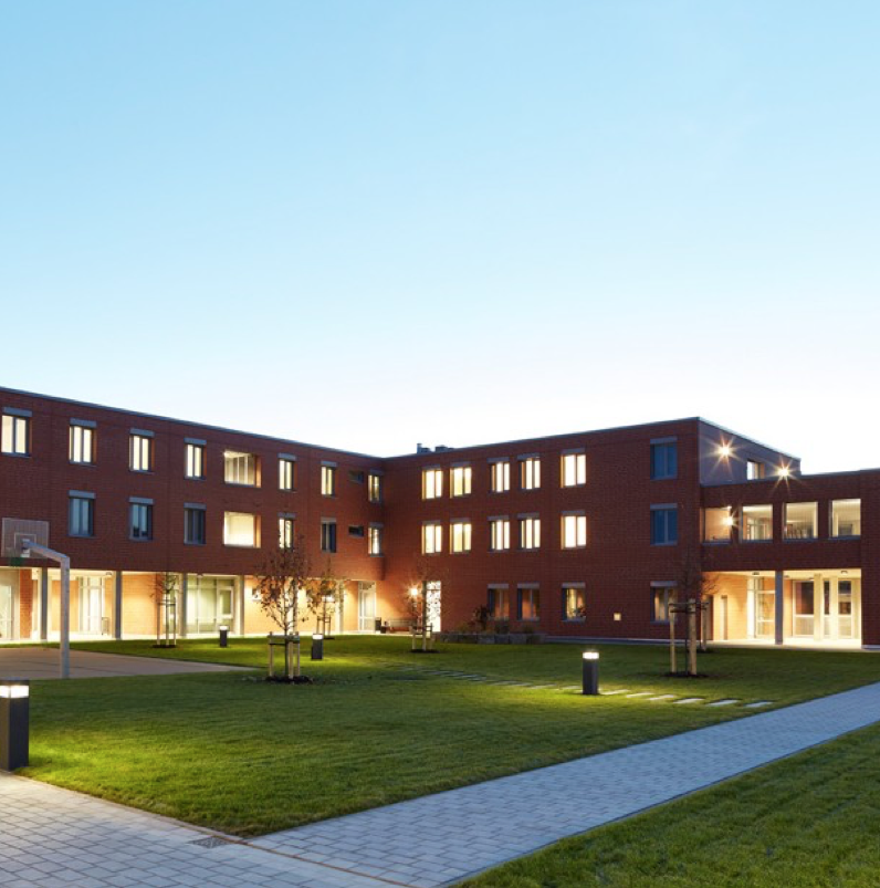 Maßregelvollzug in Göttingen, 1. Preis im Architektenwettbewerb. Foto: Daniel Zielske, Göttingen